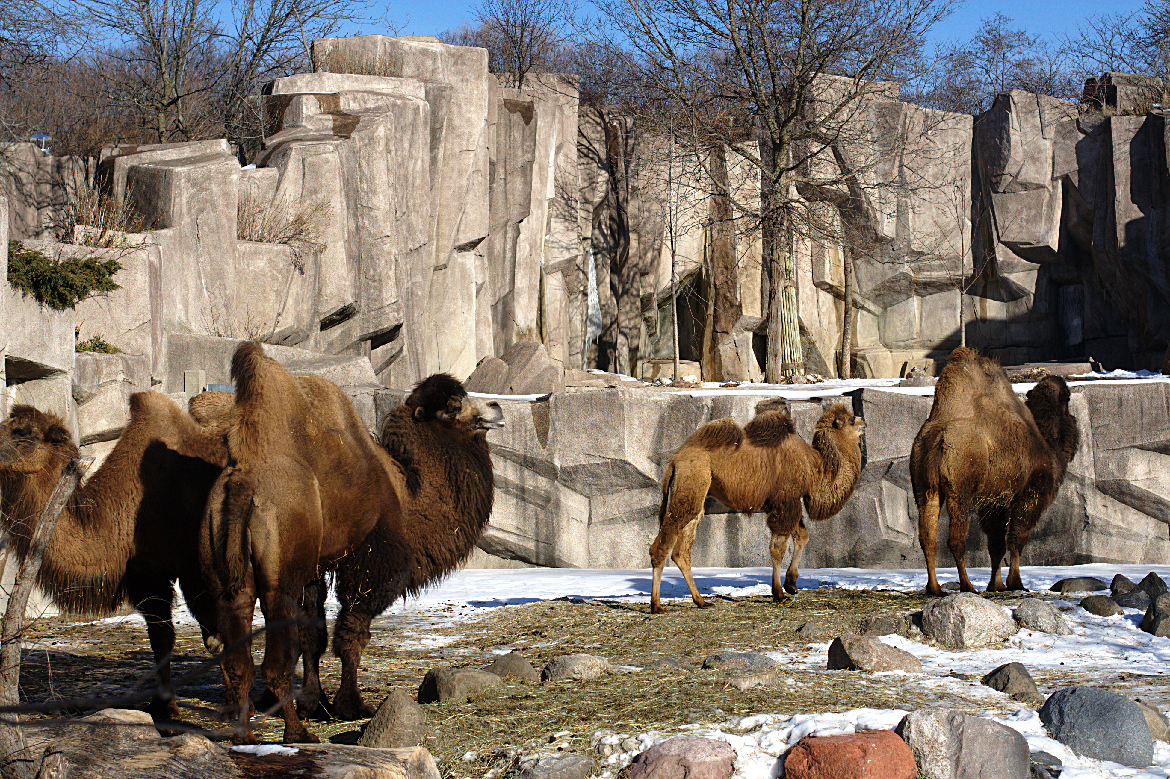 Bactrian Camels